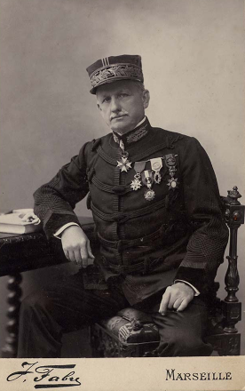 Médecin inspecteur Albert Clarac, Marseille, 1911